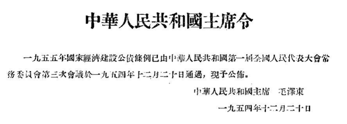 中文（中国大陆）: 中华人民共和国国务院公报 1954年第3号 第三页截图 中华人民共和国主席令